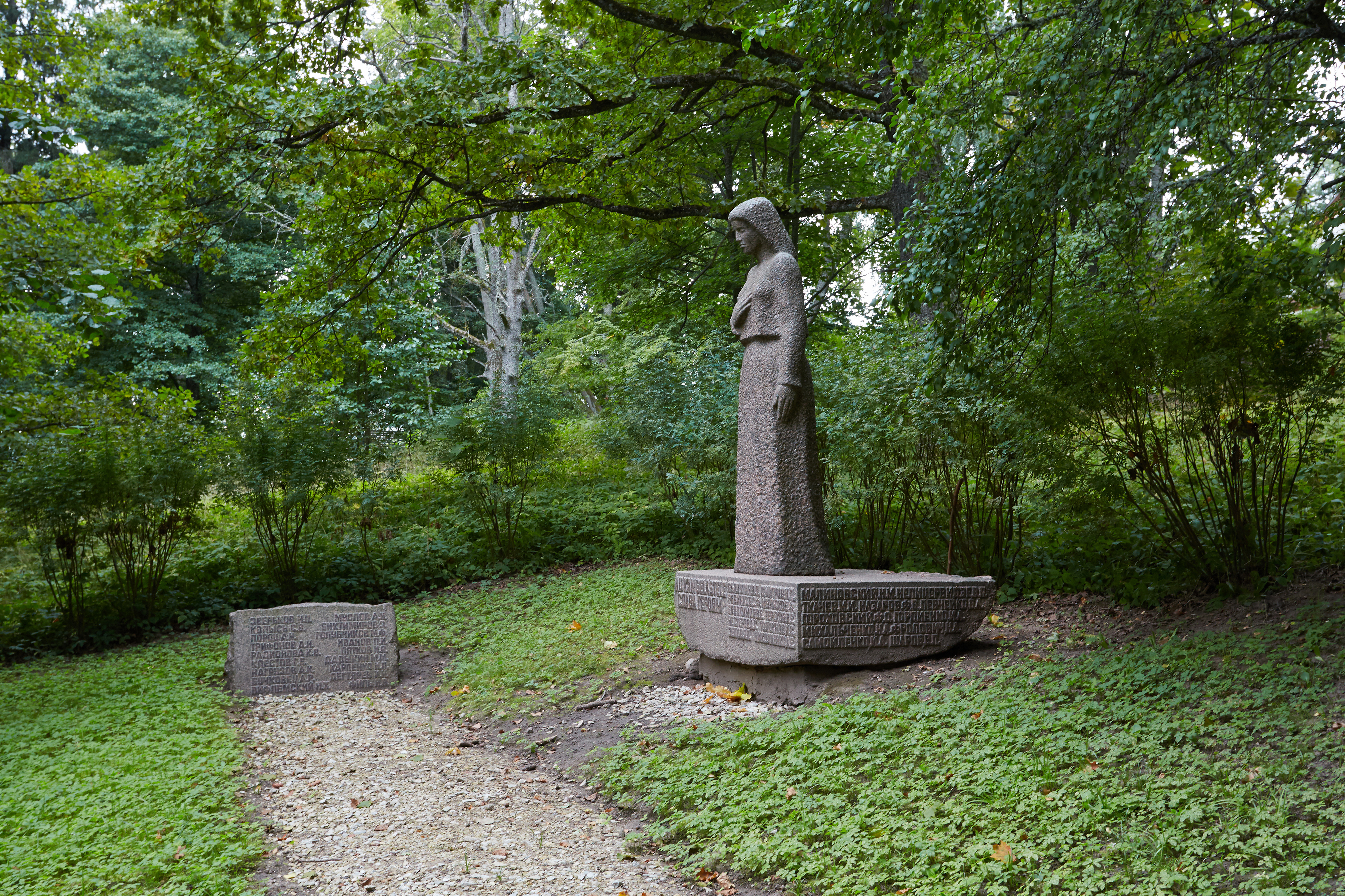 II maailmasõjas hukkunute ühishaud Tilsis 2013. aasta augustis